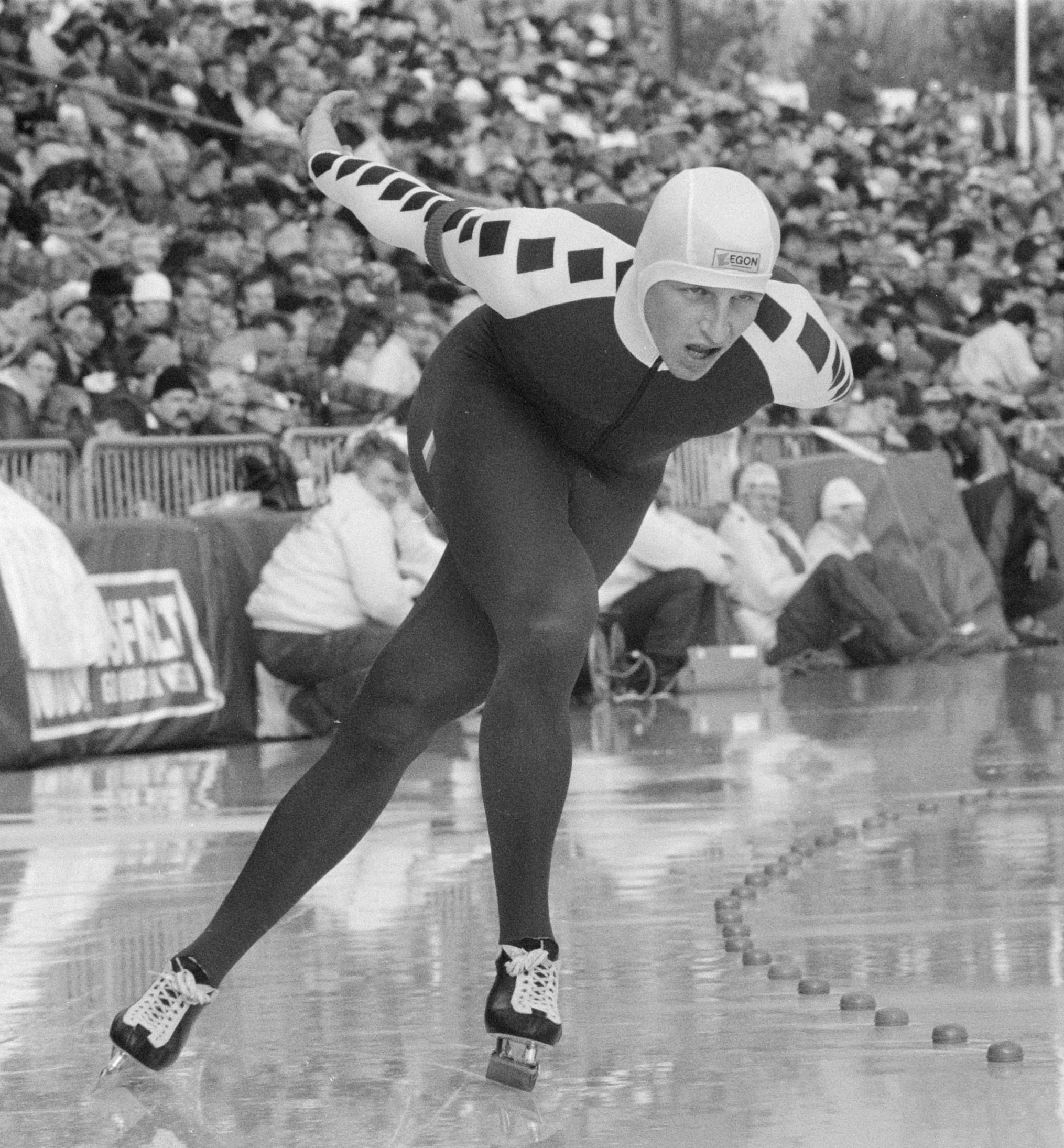 EK schaatsen heren in Den Haag ; Leo Visser in actie op 10 km.